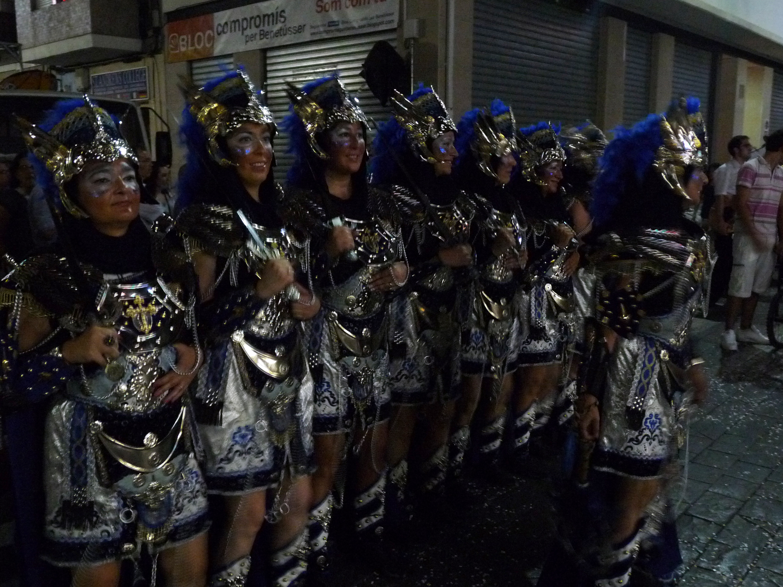 Moros de Benetússer